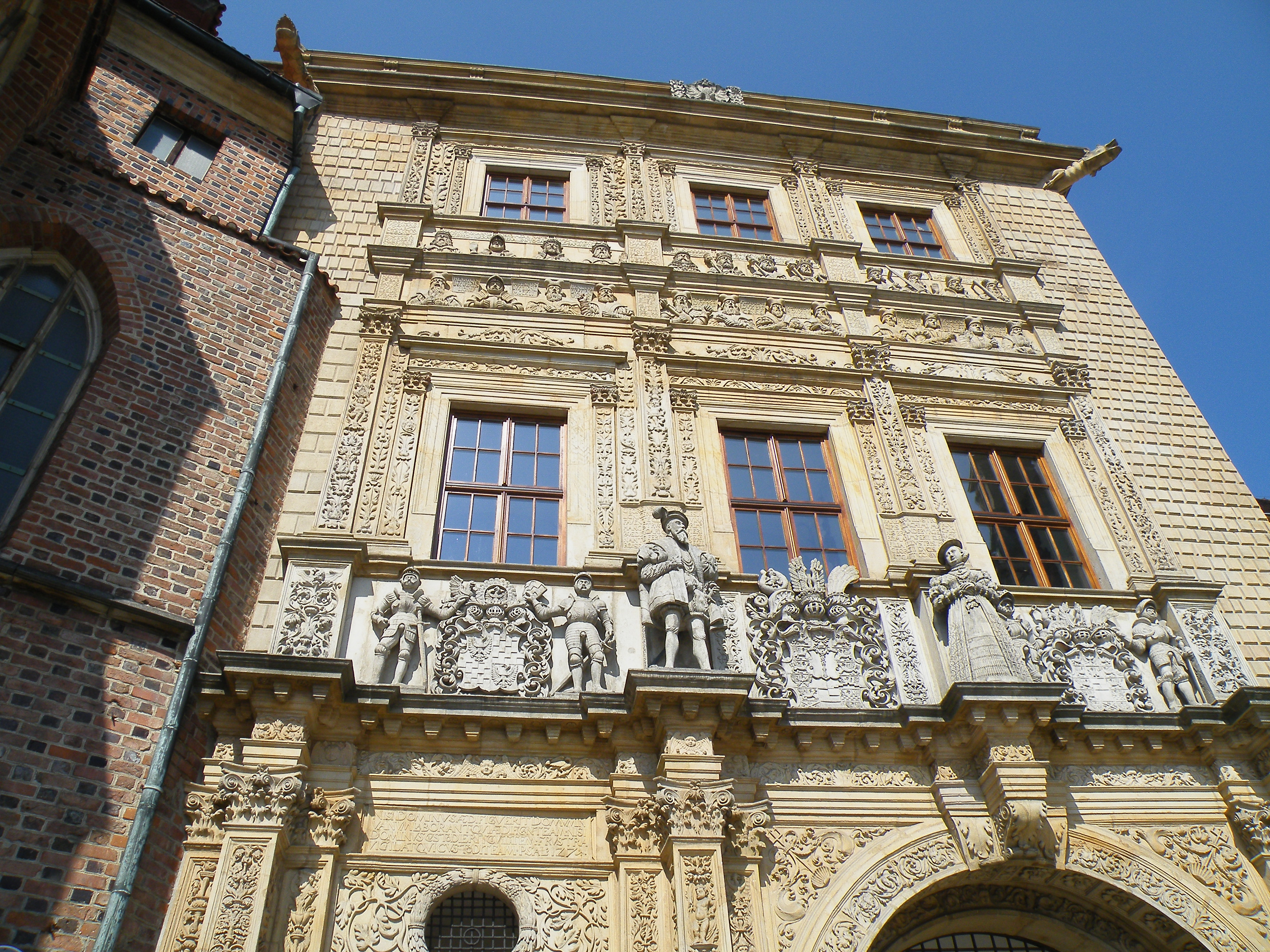 Brzeg, zamek, 1547-1586